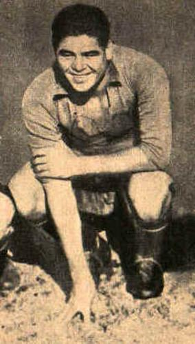 Roberto Cherro ex futbolista de Boca Juniors en 1928, Buenos Aires, Argentina